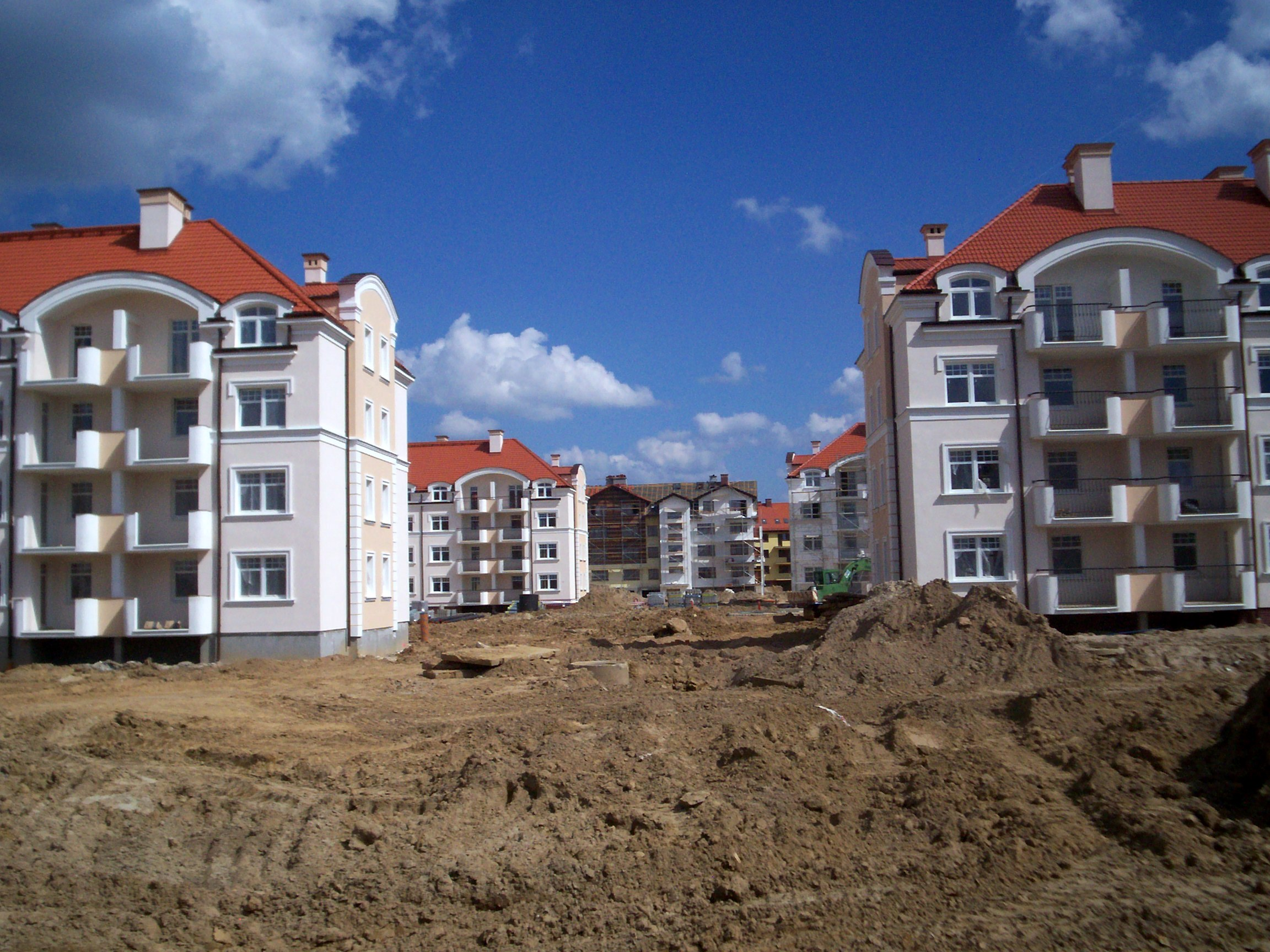 os. Belweder w Olsztynie, kwiecień 2008